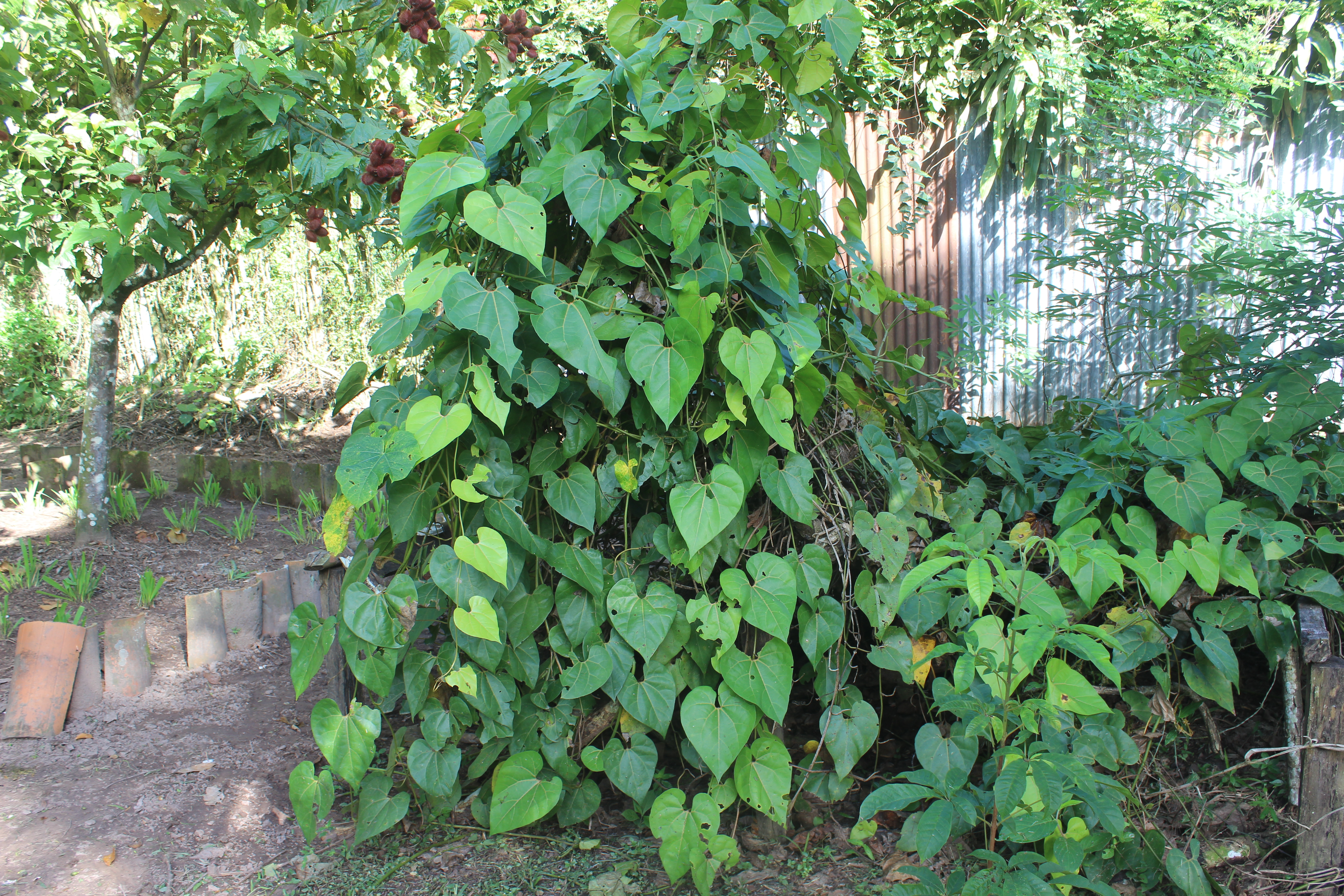 Yawar panga (Aristolochia didyma) del Jardín Botánico del Centro Takiwasi, Tarapoto, Perú. La yawar panga es utilizada dentro de la medicina tradicional amazónica como una planta de purga o depurativa.